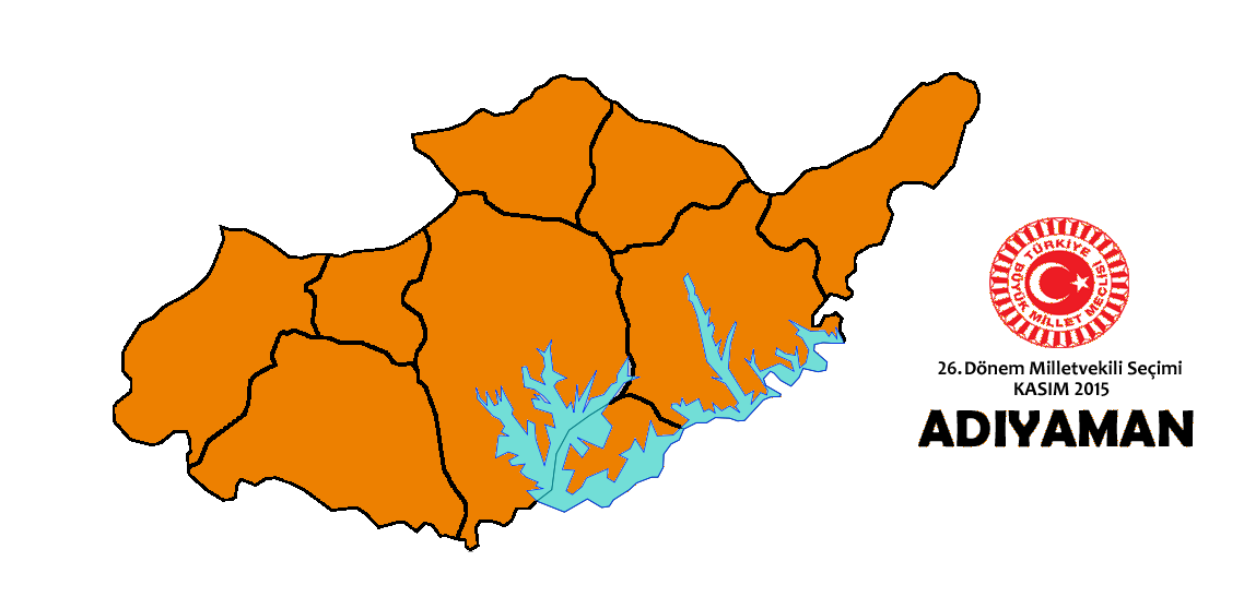 Kasım 2015 seçimleri